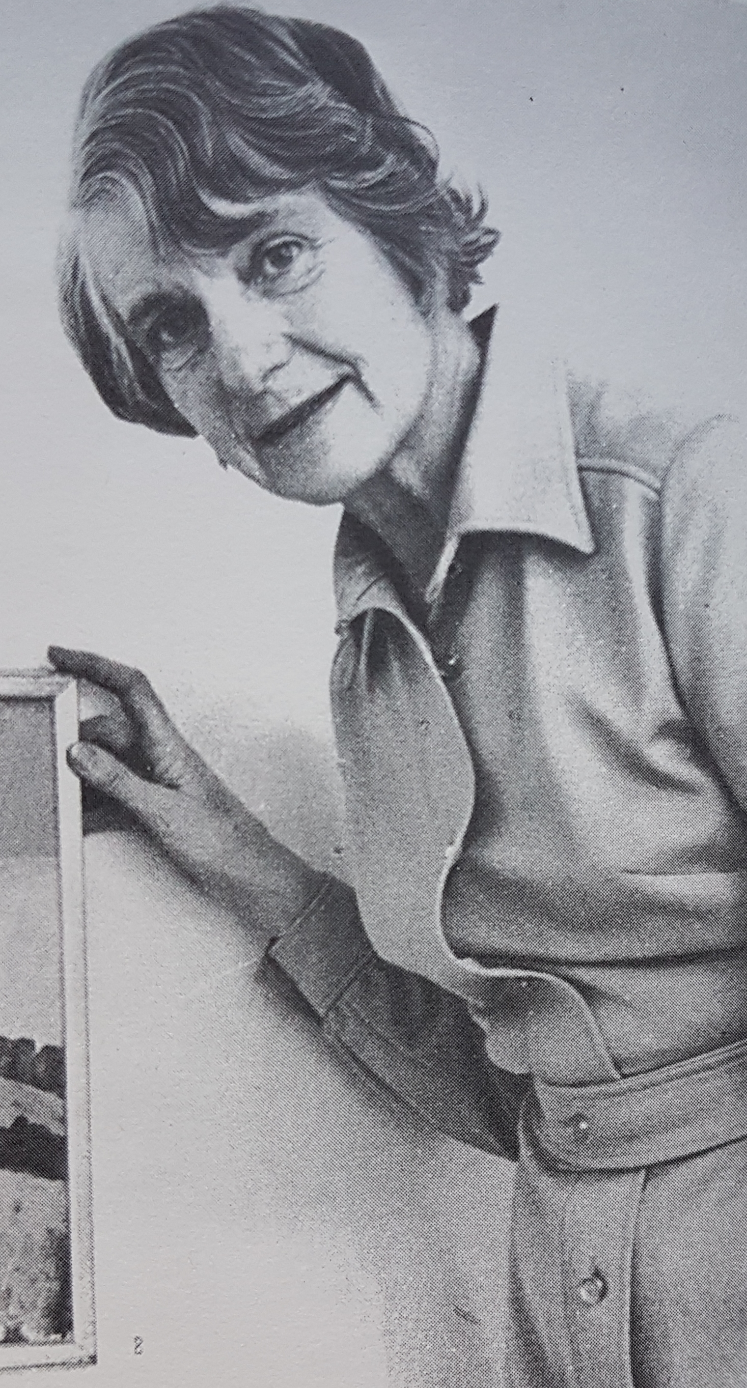 Lisa Holmström Artist from Sweden